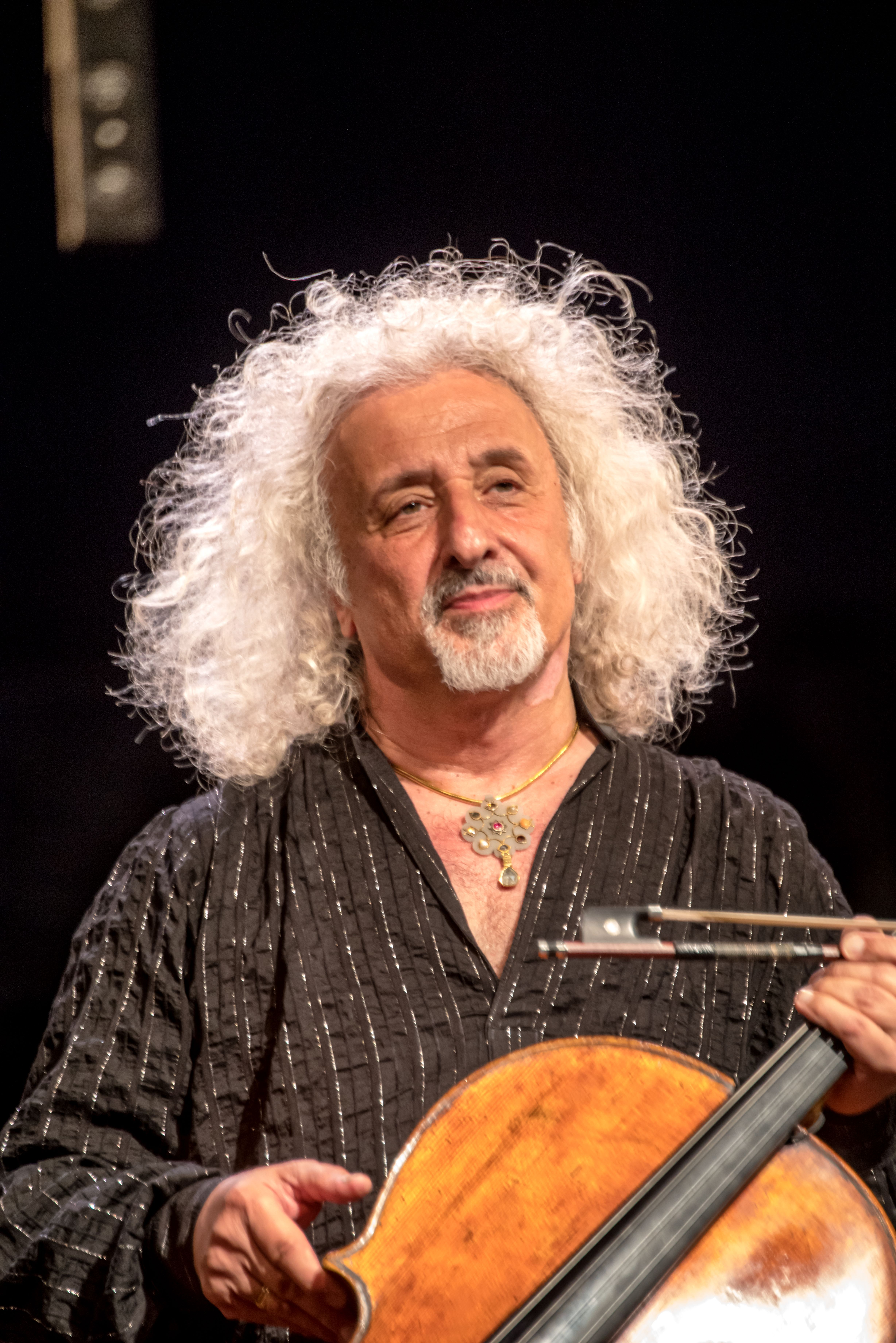 Bilder vom Zelt Musik Festival 2016 in Freiburg im Breisgau Die Gala